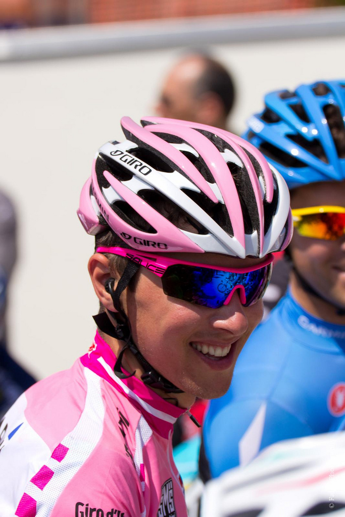 Partenza Giro d'Italia Modena (47 di 67)